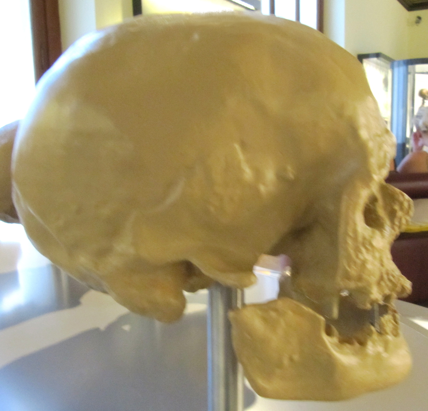 Mensch Cro-Magnon (Cro-Magnon 1), Schaedel, Kunsthistorisches Museum, Wien